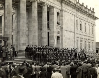 Coro 6